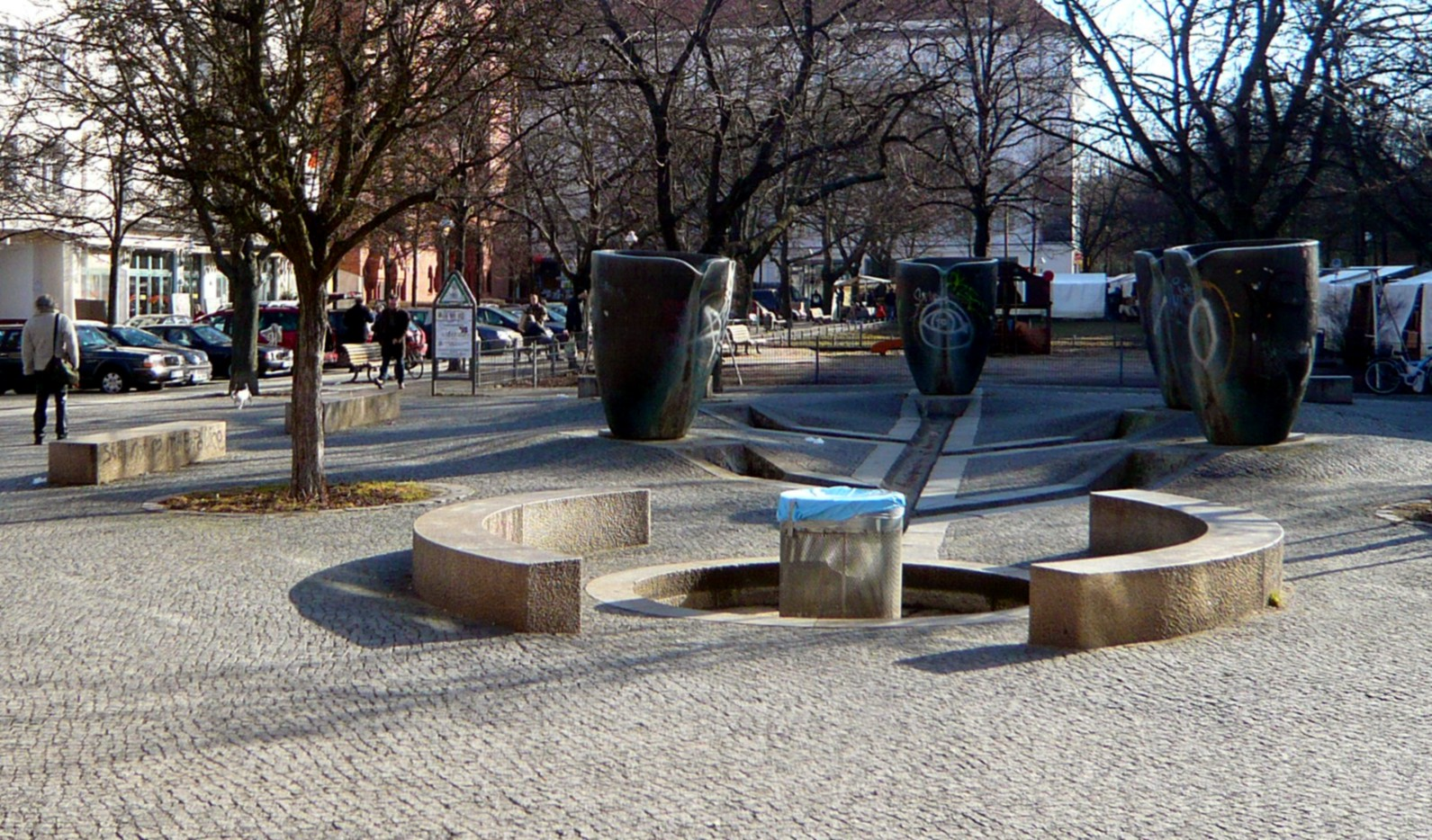 Berlin-Kreuzberg, Marheinekeplatz, Vor der Markthalle, Fünf-Tiegel-Brunnen